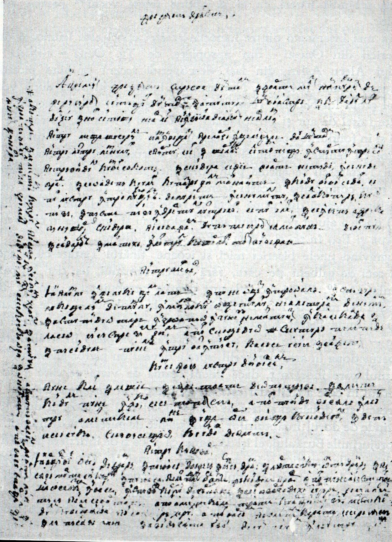 Fața unei scrisori de patru pagini din anul 1811, semnată de Costache zugrav, cu rețete de pictură, pe care a folosit-o pictorul Gheorghe Tatarescu.(referință: Jacques Wertheimer-Ghika... pag. 285)